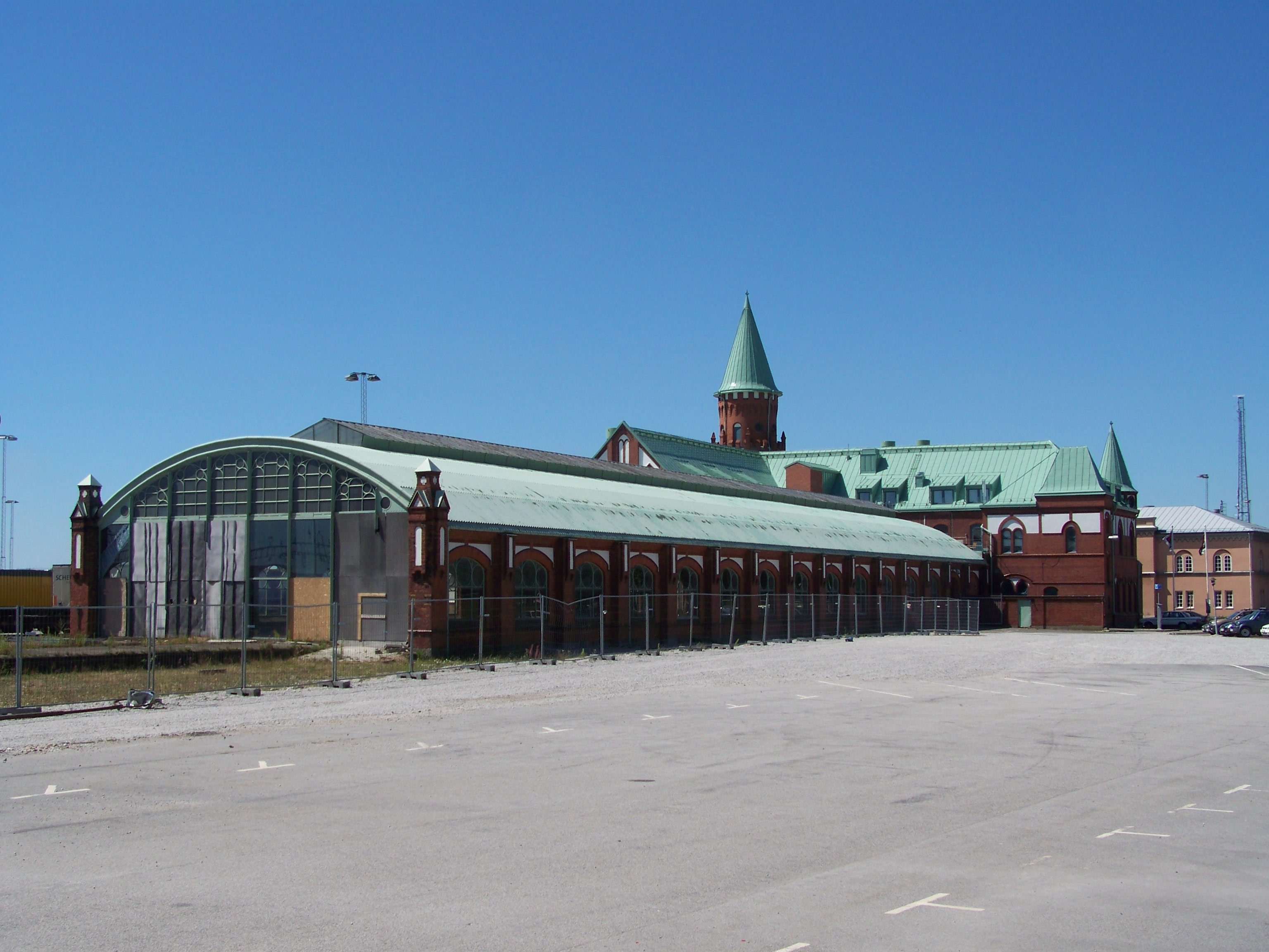 Trelleborg, alter Bahnhof